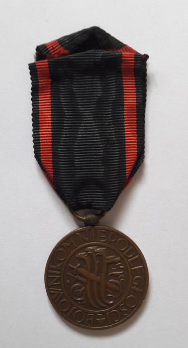 Awers MN